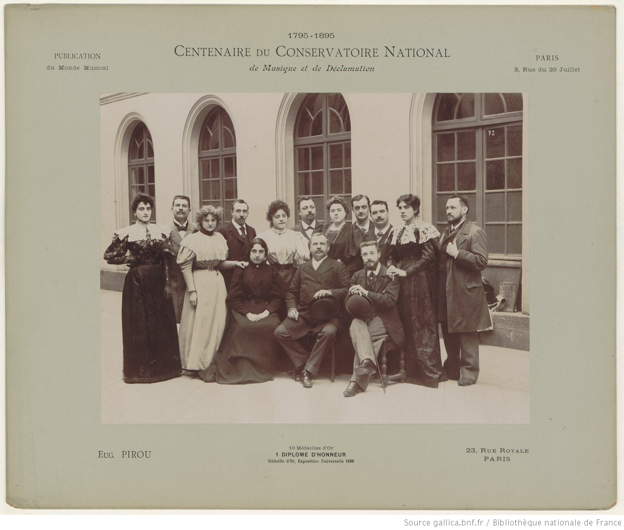 Centenaire du Conservatoire national de Paris (Melchissédec professeur de chant ; Pirou photographe) provenant du Monde Musical (Paris) : 1895